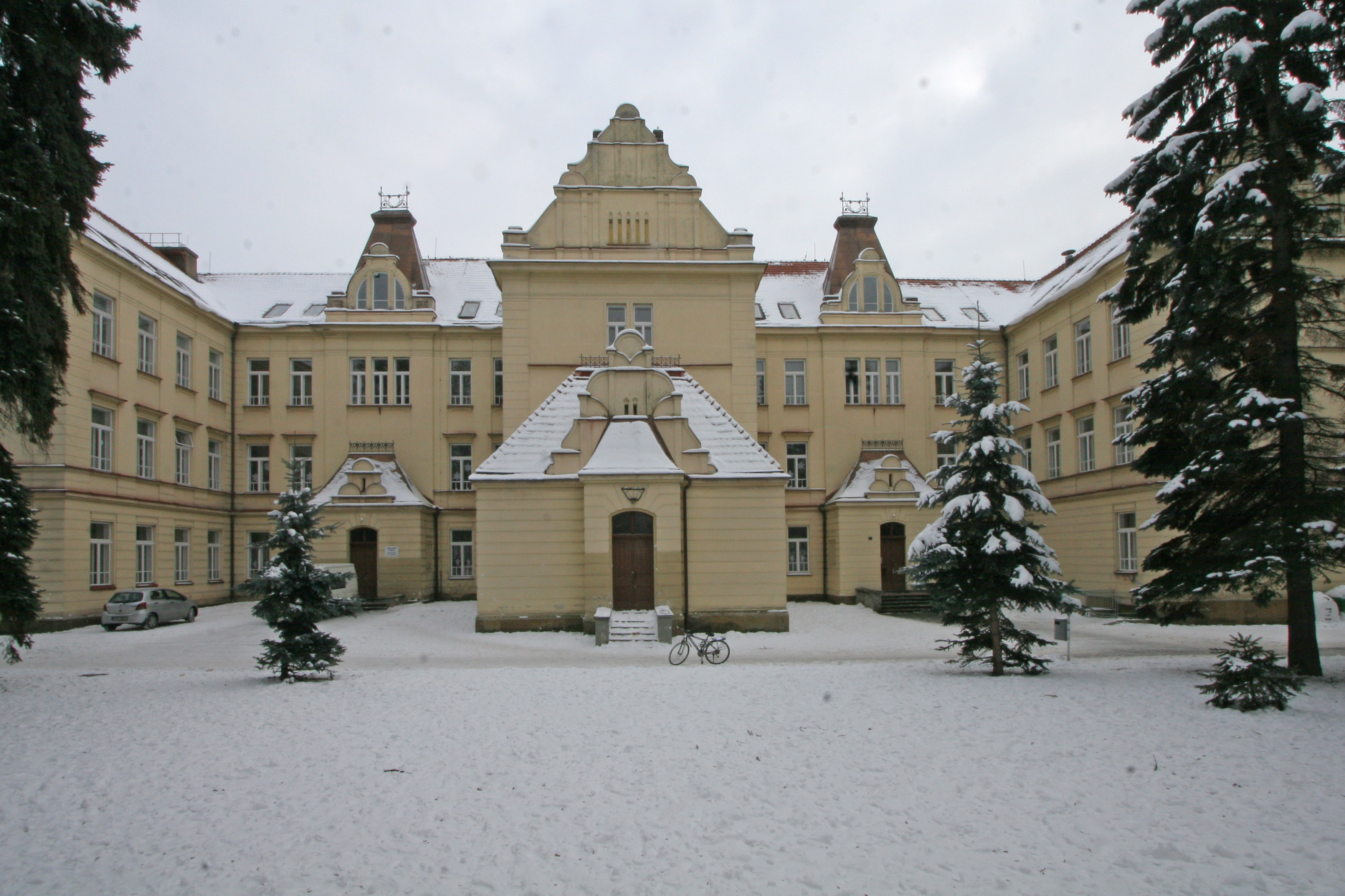 Základní škola, Javornického 2, Vysoké Mýto